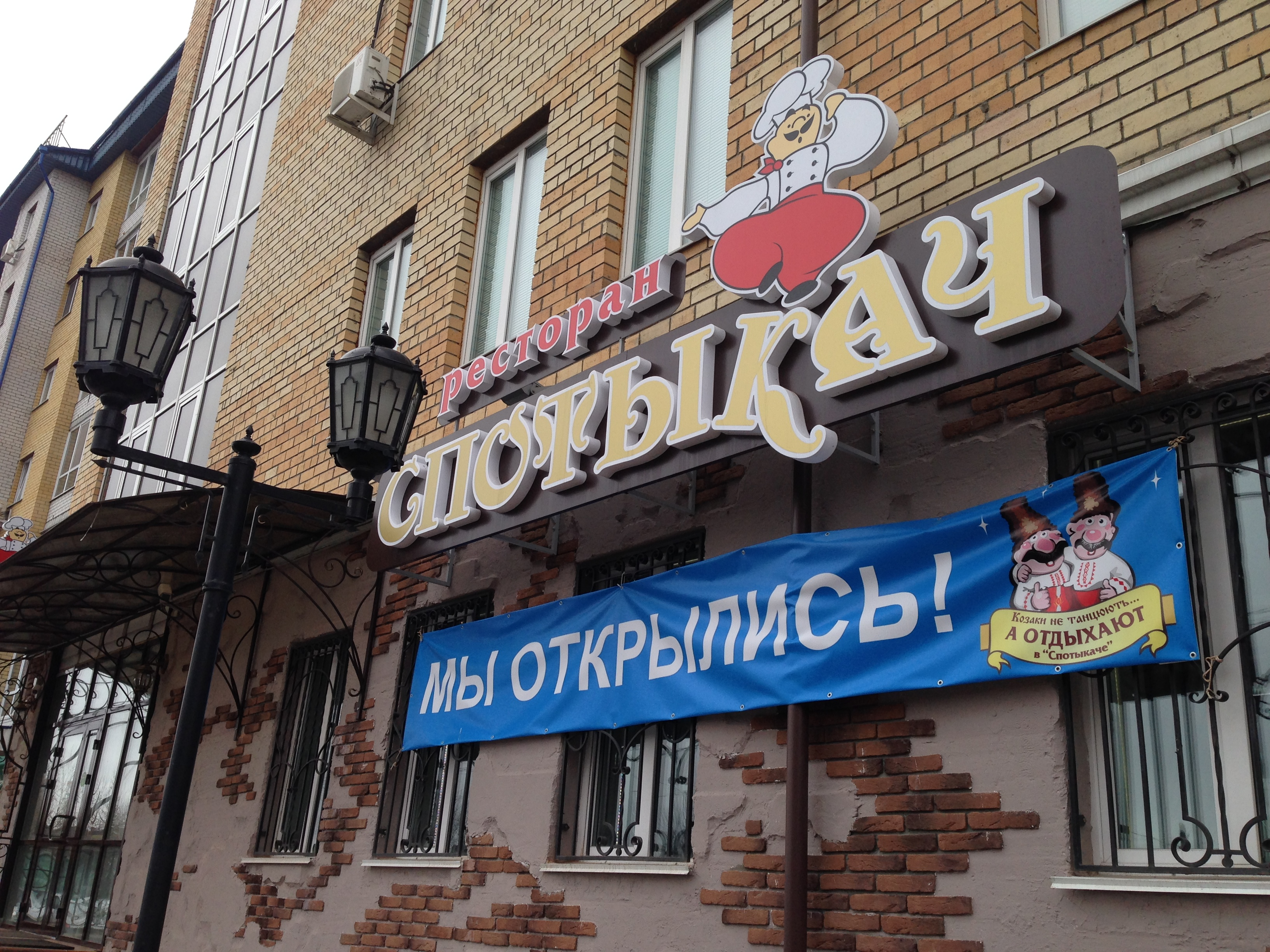 Strato Herzen. Tjumeno, Rusio.